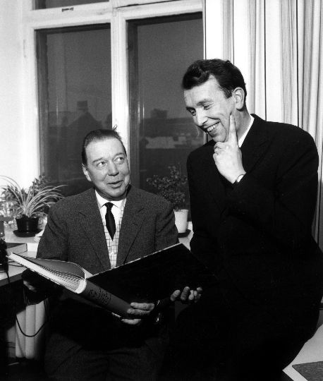 Kirjailija Mika Waltari ja elokuvaohjaaja Matti Kassila kertovat Fennada-filmin tiloissa uudesta Palmu-elokuvasta Tähdet kertovat, komisario Palmu.